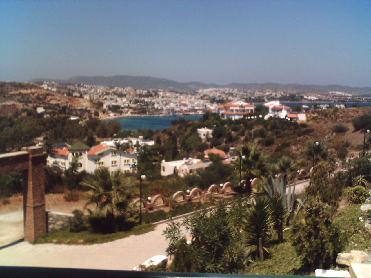 Dosya yükleyen kullanıcıya aittir. Resim Datça, Muğla'da çekilmiştir.